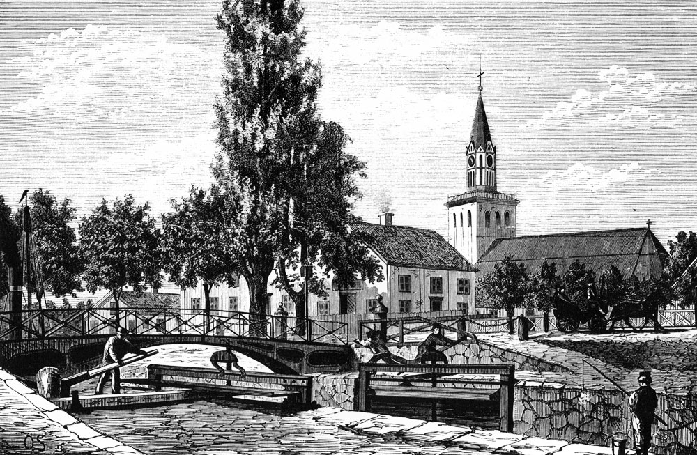 Göta Kanal vid Motala. Inloppet från Vättern.